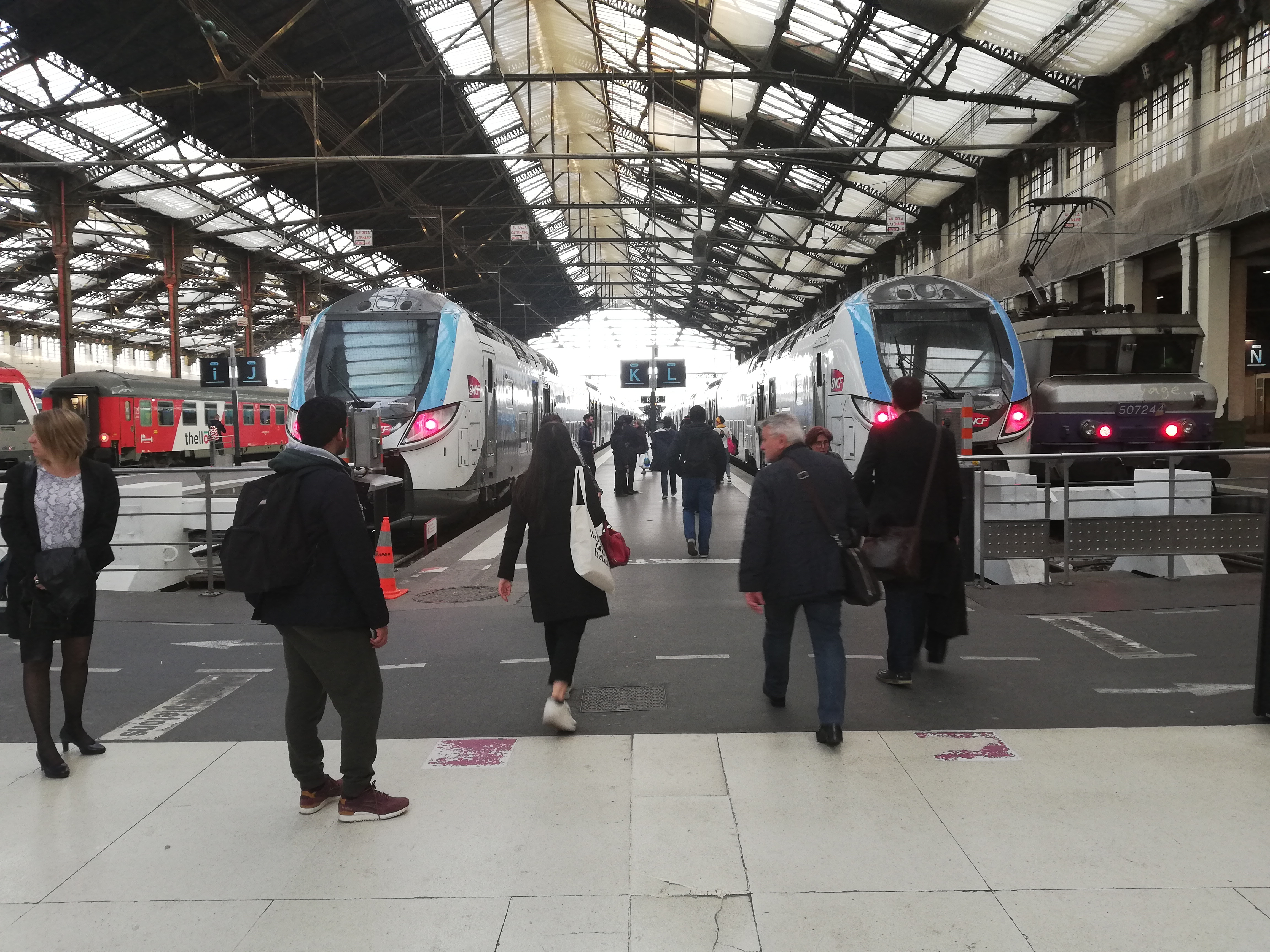 Deux Régio 2N stationnent à Paris-Gare-de-Lyon, en 2019.